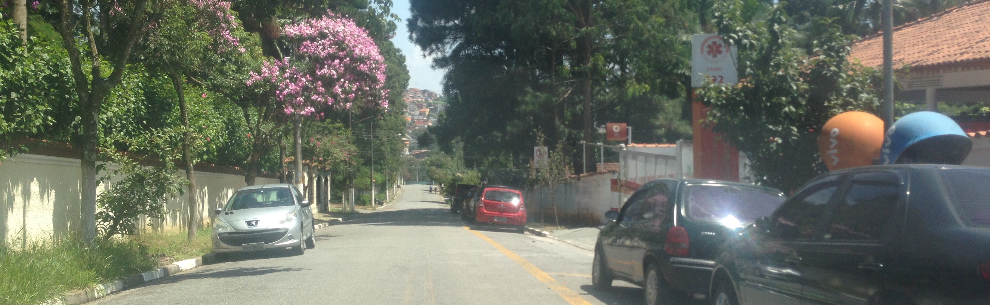 Via da Vila Romanópolis em Ferraz de Vasconcelos/SP, Brasil.